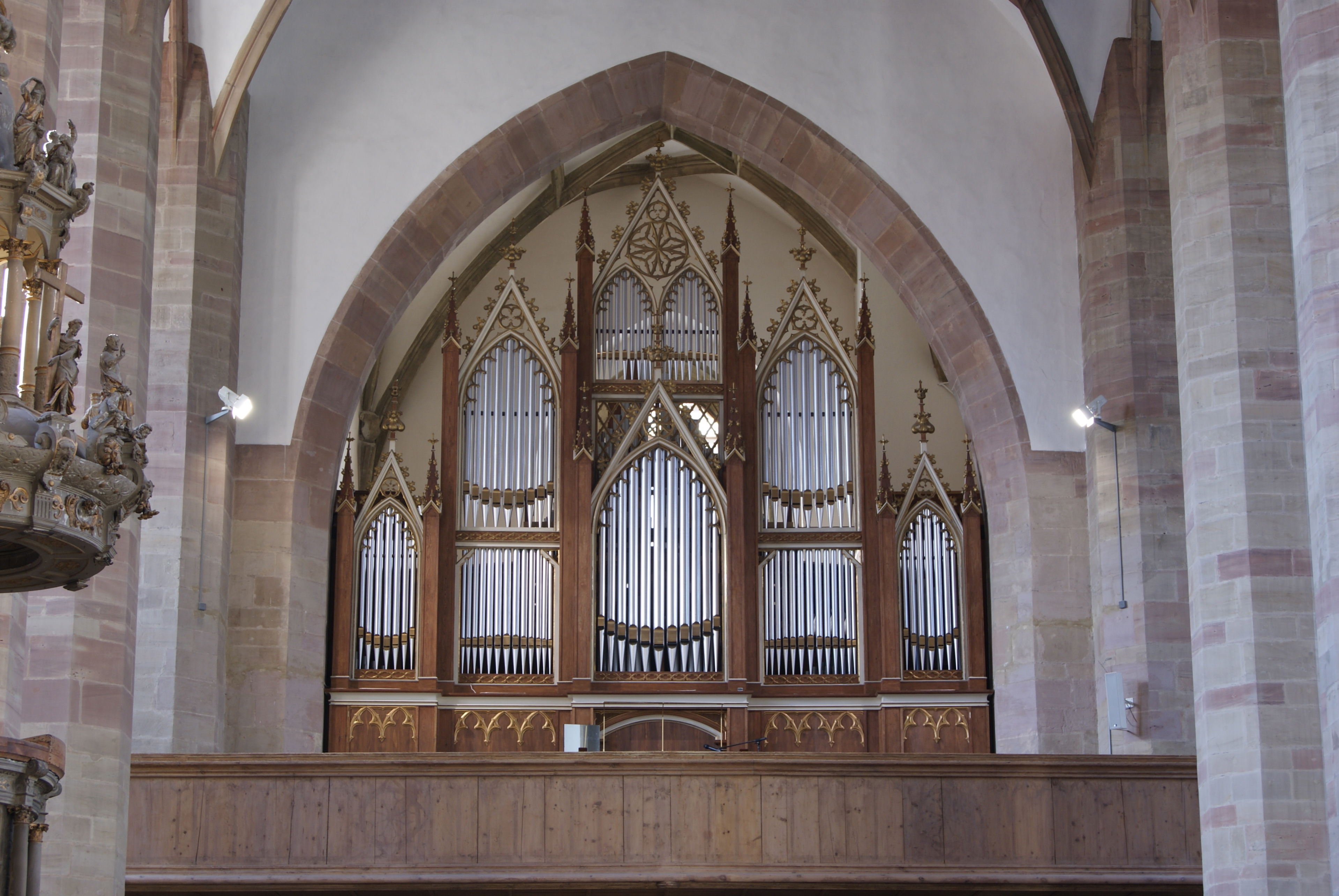 Sauer-Orgel Moritzkirche Halle (Saale)